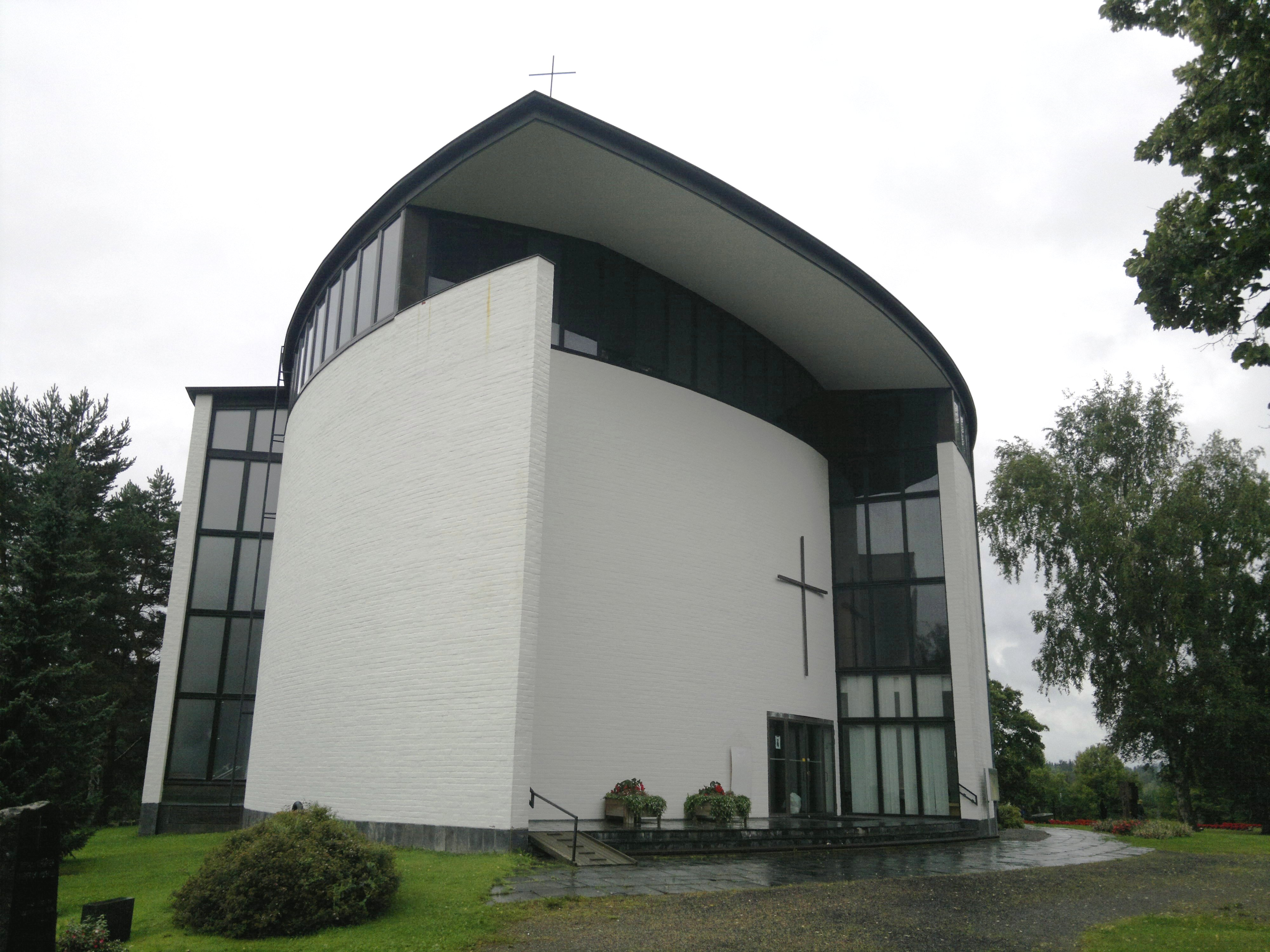 Oriveden kirkko 2013